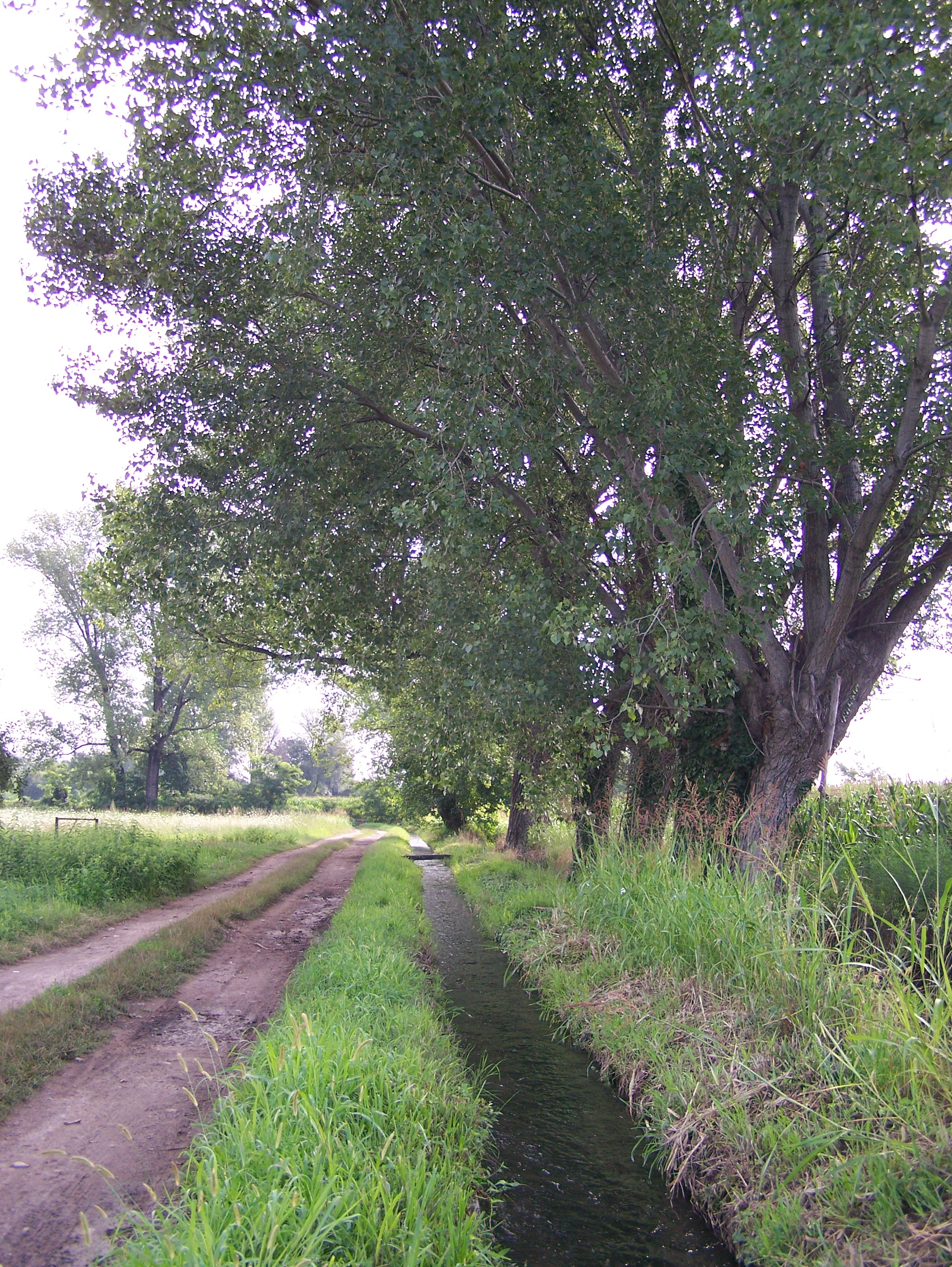 Canale d'irrigazione a Preloreto, località di Corbetta (MI) - Italia